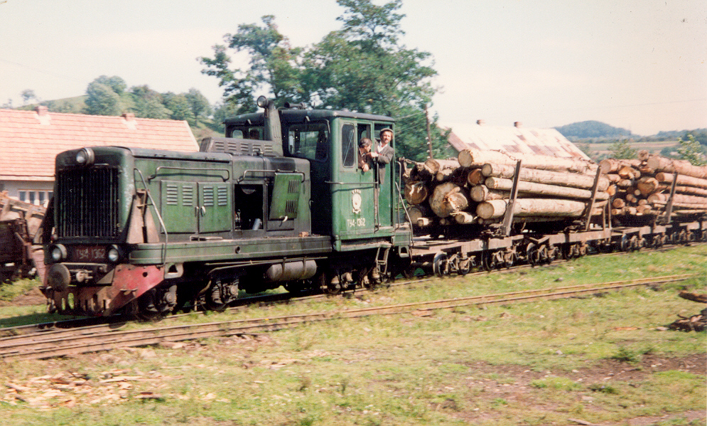 Vlak s drevem na oplenovych vozech. Teresva (zeleznice Ust Corna, Zakarpatska Ukrajina, asi rok 1992.